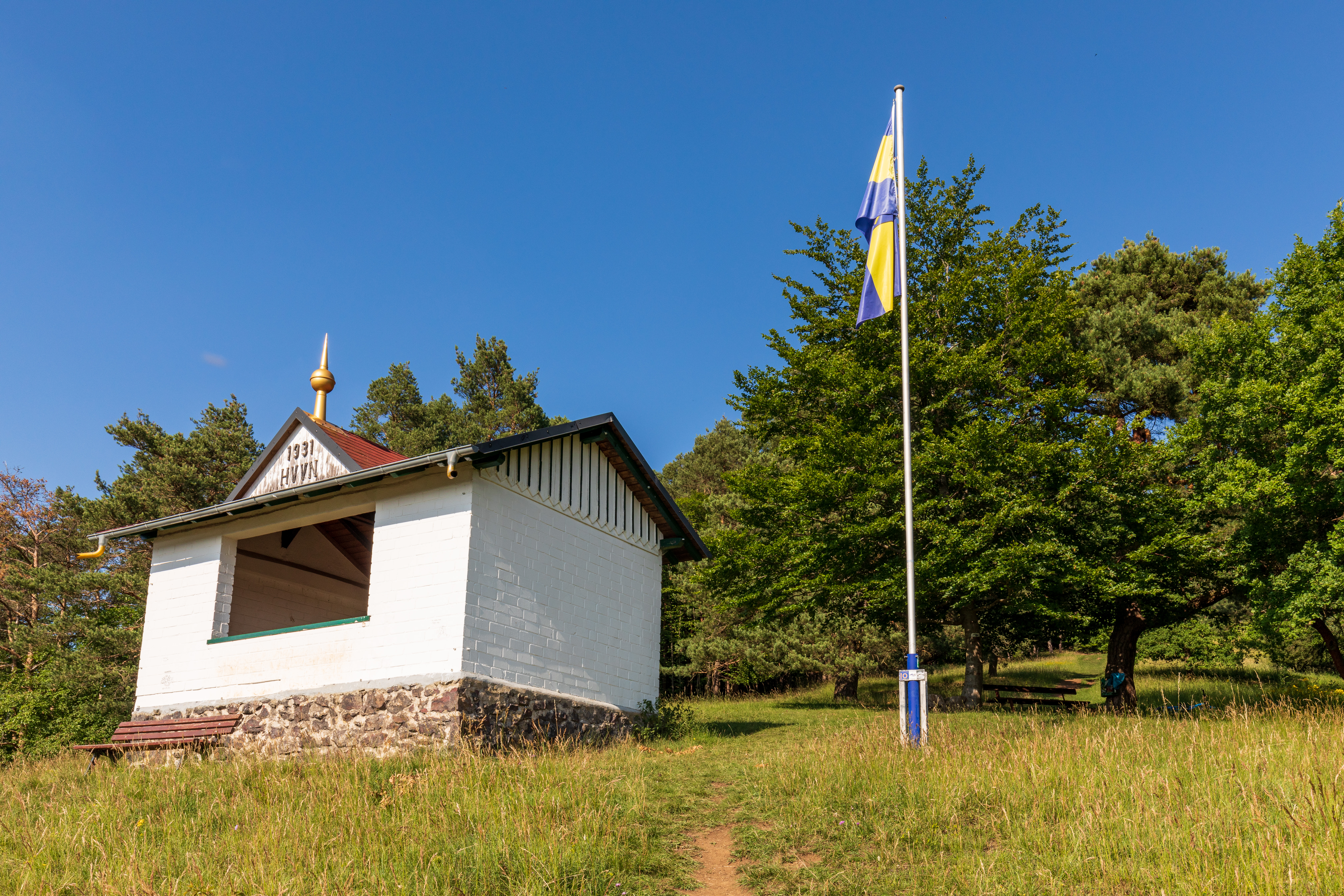 (NSG:HE-1532028)_Weißehöll bei Niederscheld